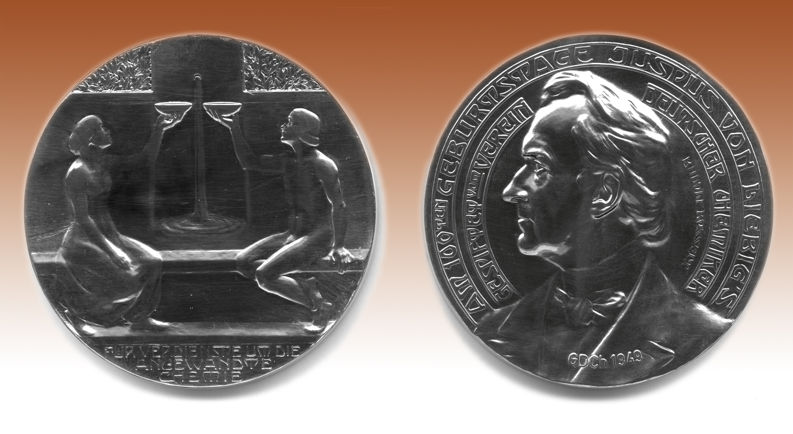 Abbildung der Medaille (Vor- und Rückseite)